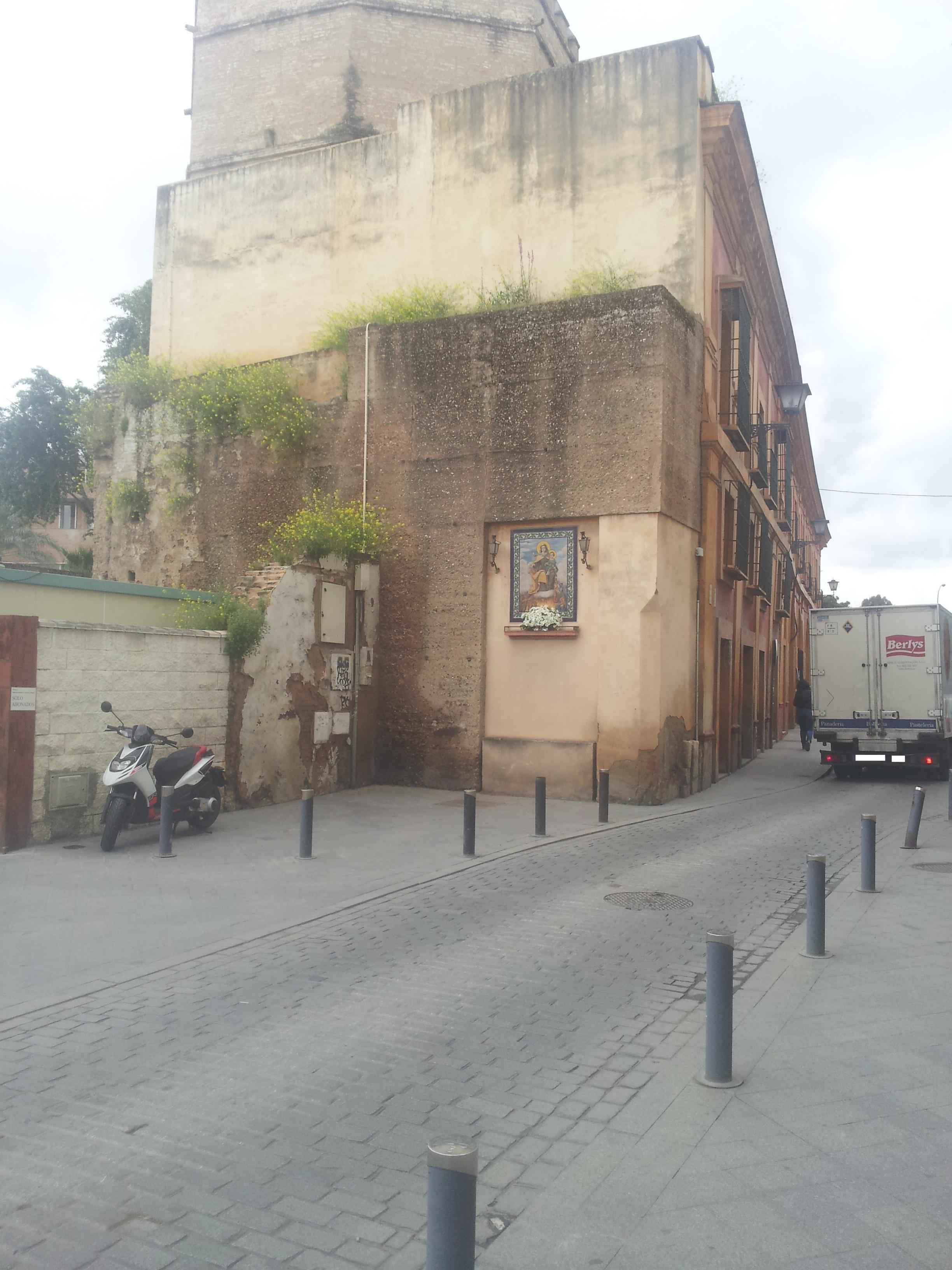 Lugar donde se situaba el Postigo del Carbón, uno de los accesos a la ciudad de Sevilla que tenía la antigua muralla